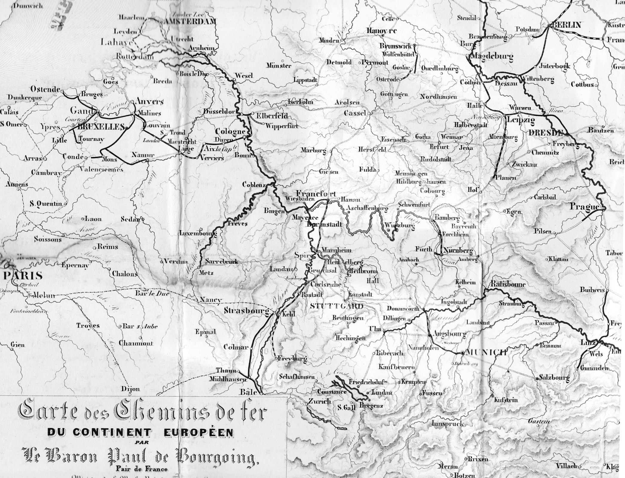 Étude comparative des chemins de fer en France et en Europe. "Plusieurs états de l'Europe nous ont devancé dans la construction des chemins de fer, mais cette avance est peu considérable et nous pouvons regagner le temps perdu" (sic).